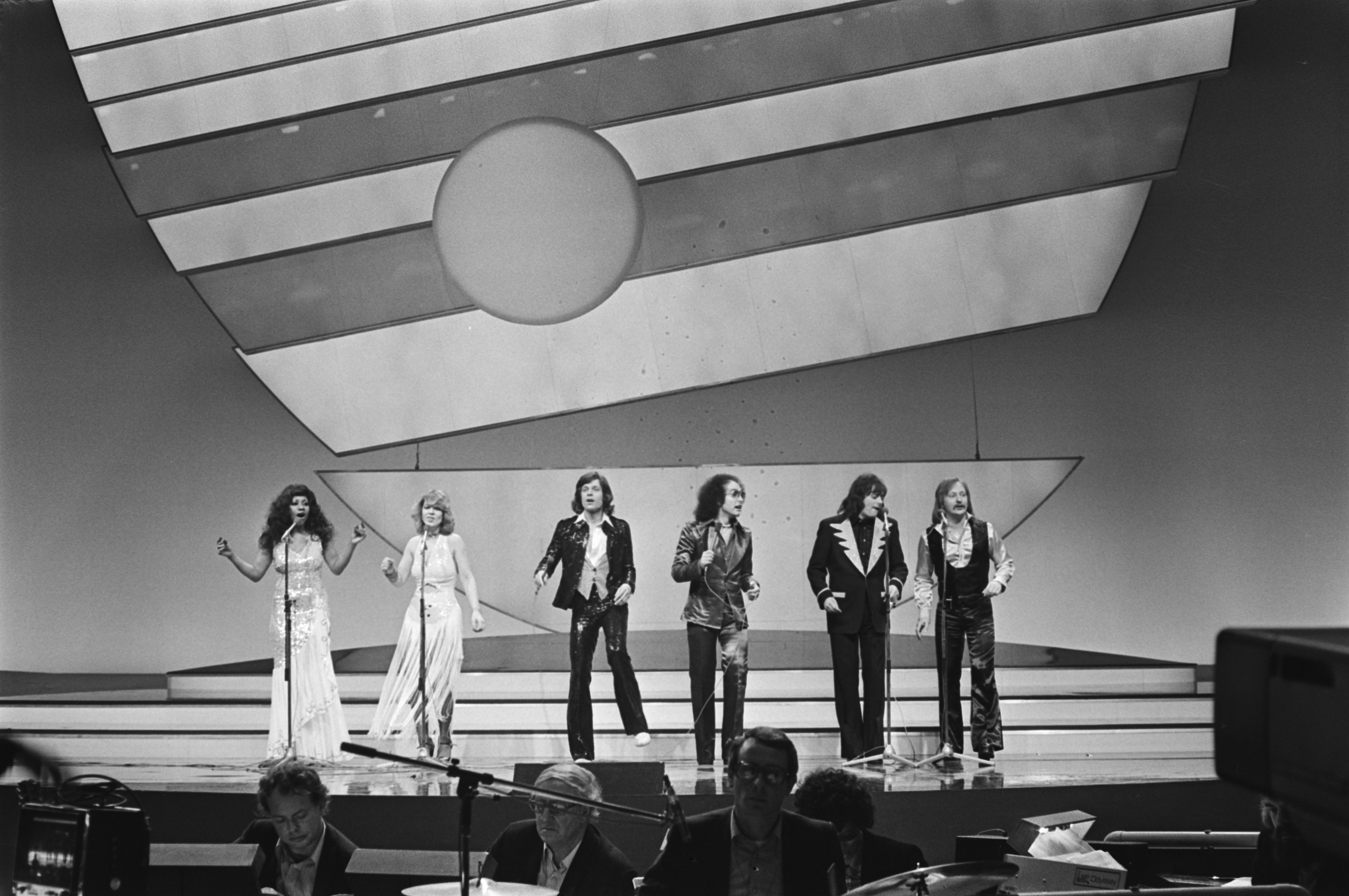 Collectie / Archief : Fotocollectie Anefo Reportage / Serie : [ onbekend ] Beschrijving : Eurovisie Songfestival 76 Den Haag ; Les Humphries Singers (Duitsland) Datum : 3 april 1976 Locatie : Den Haag, Duitsland Trefwoorden : songfestivals Persoonsnaam : Eurovisie Songfestival Fotograaf : Mieremet, Rob / Anefo Auteursrechthebbende : Nationaal Archief Materiaalsoort : Negatief (zwart/wit) Nummer archiefinventaris : bekijk toegang 2.24.01.05 Bestanddeelnummer : 928-5028